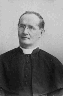 František Xaver Paleček (1859-1926), jihočeský římskokatolický kněz